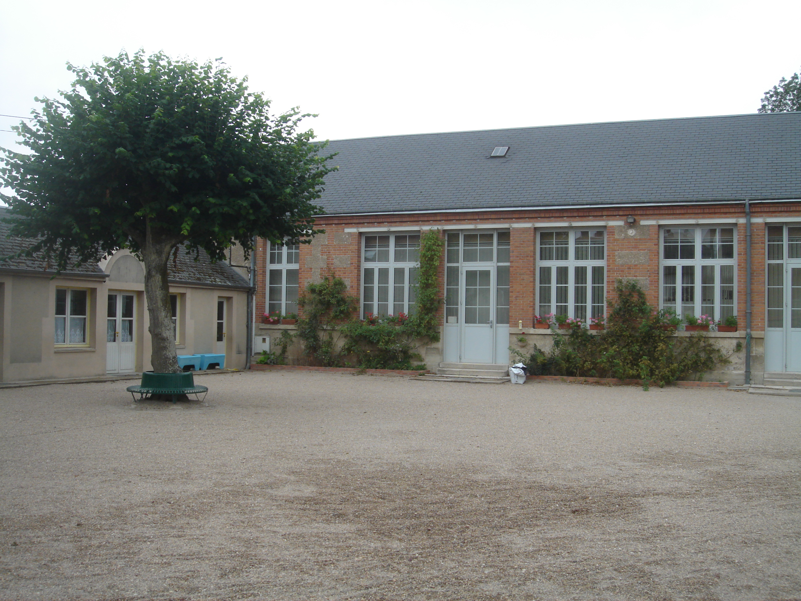 Ecole Faubourg-Berry (CP, CE1, CE2), Jargeau, Loiret, France.